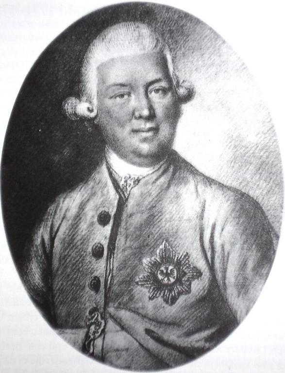 Georg Nicolaus von Lübbers - zeitgenössisches Aquarell